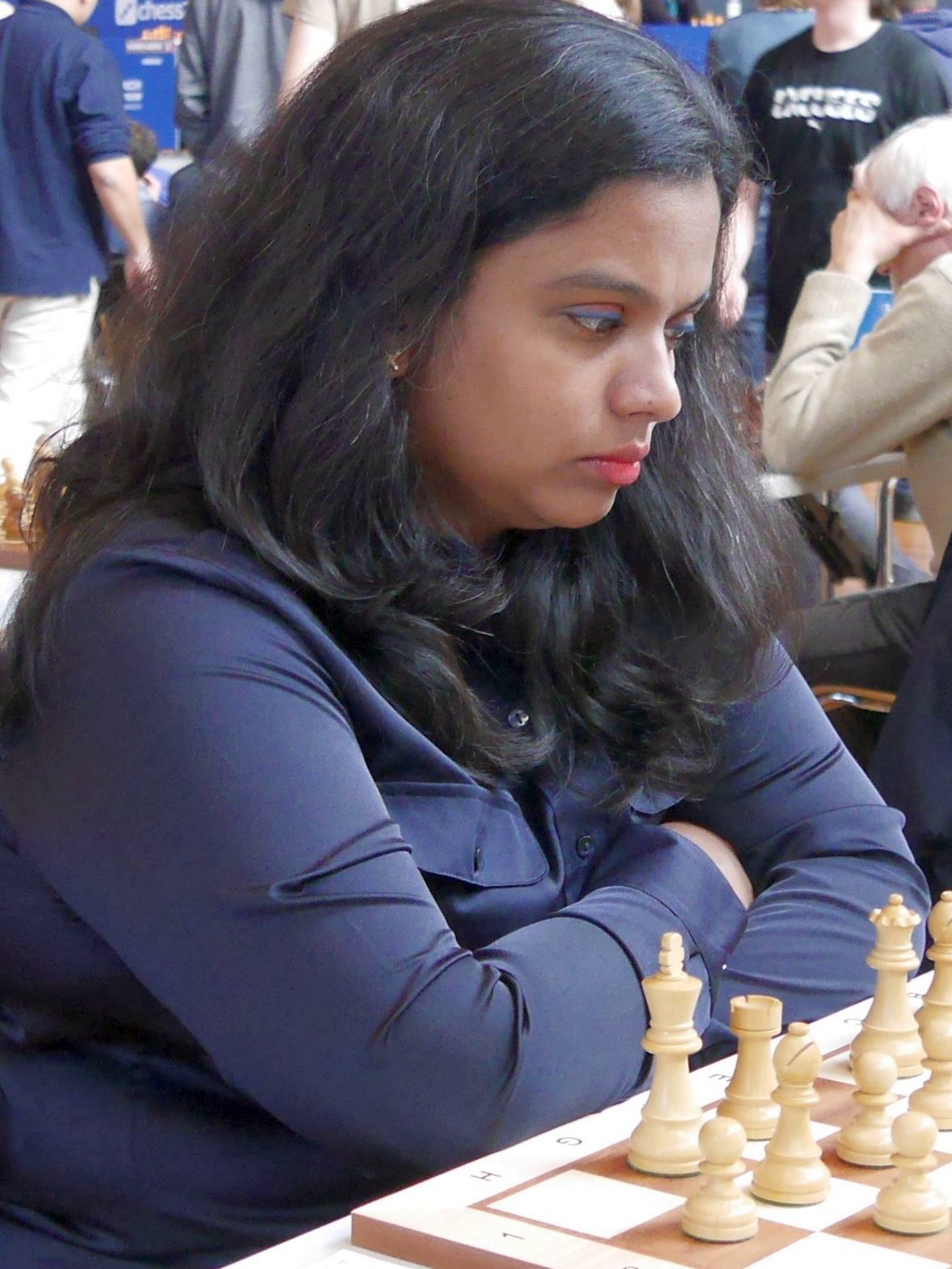 Subbaraman Vijayalakshmi, Grenke Chess Open 2018 in Karlsruhe.